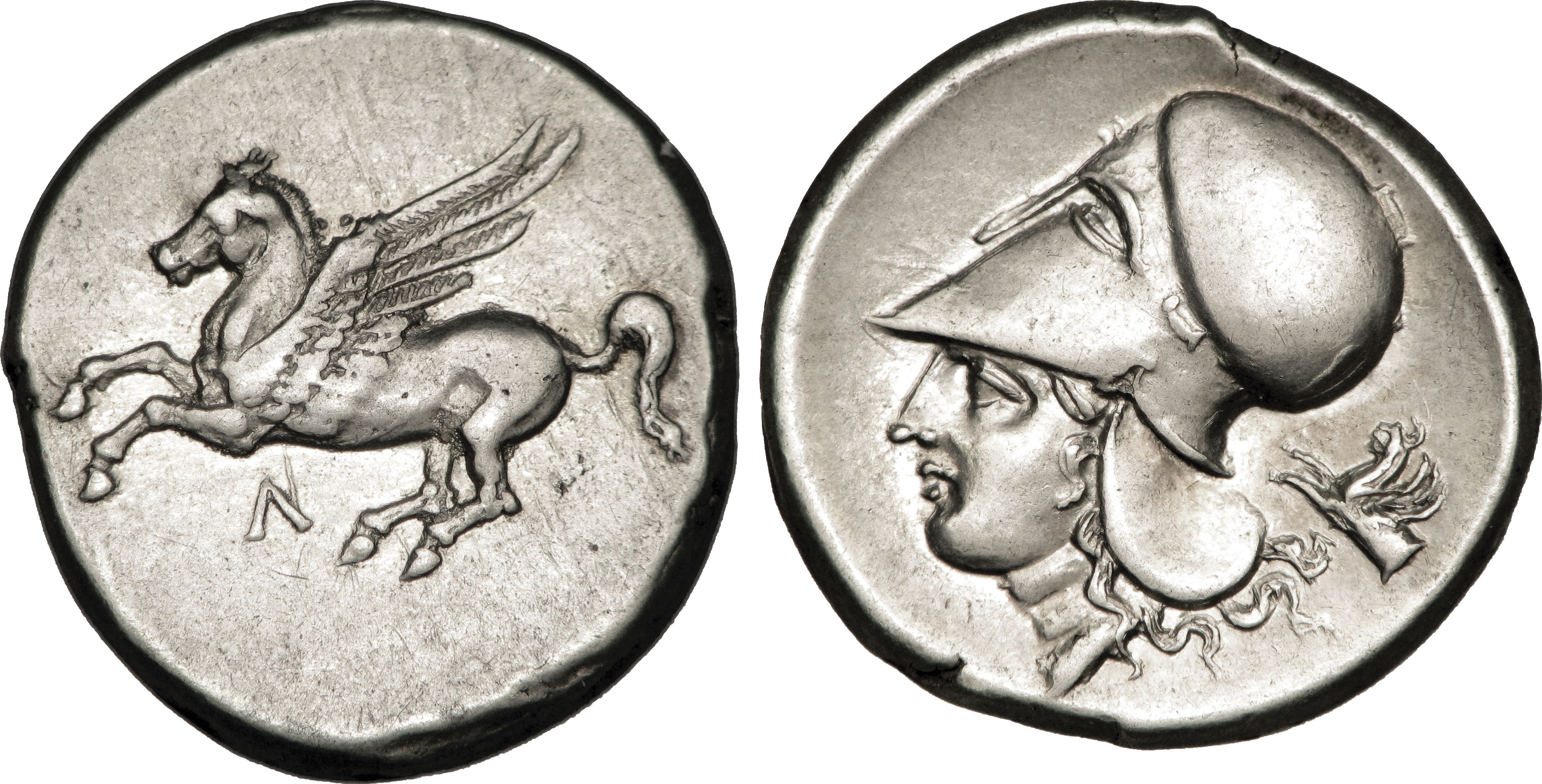 Nom de l'atelier : Acarnanie, Leucas Métal : argent Diamètre : 21mm Axe des coins : 3h. Poids : 8,57g. Description avers : Pégase volant à gauche. Légende avers : L Traduction avers : (Leucas). Description revers : Tête d'Athéna à gauche, coiffée du casque corinthien ; derrière, un protomé de griffon bondissant à gauche